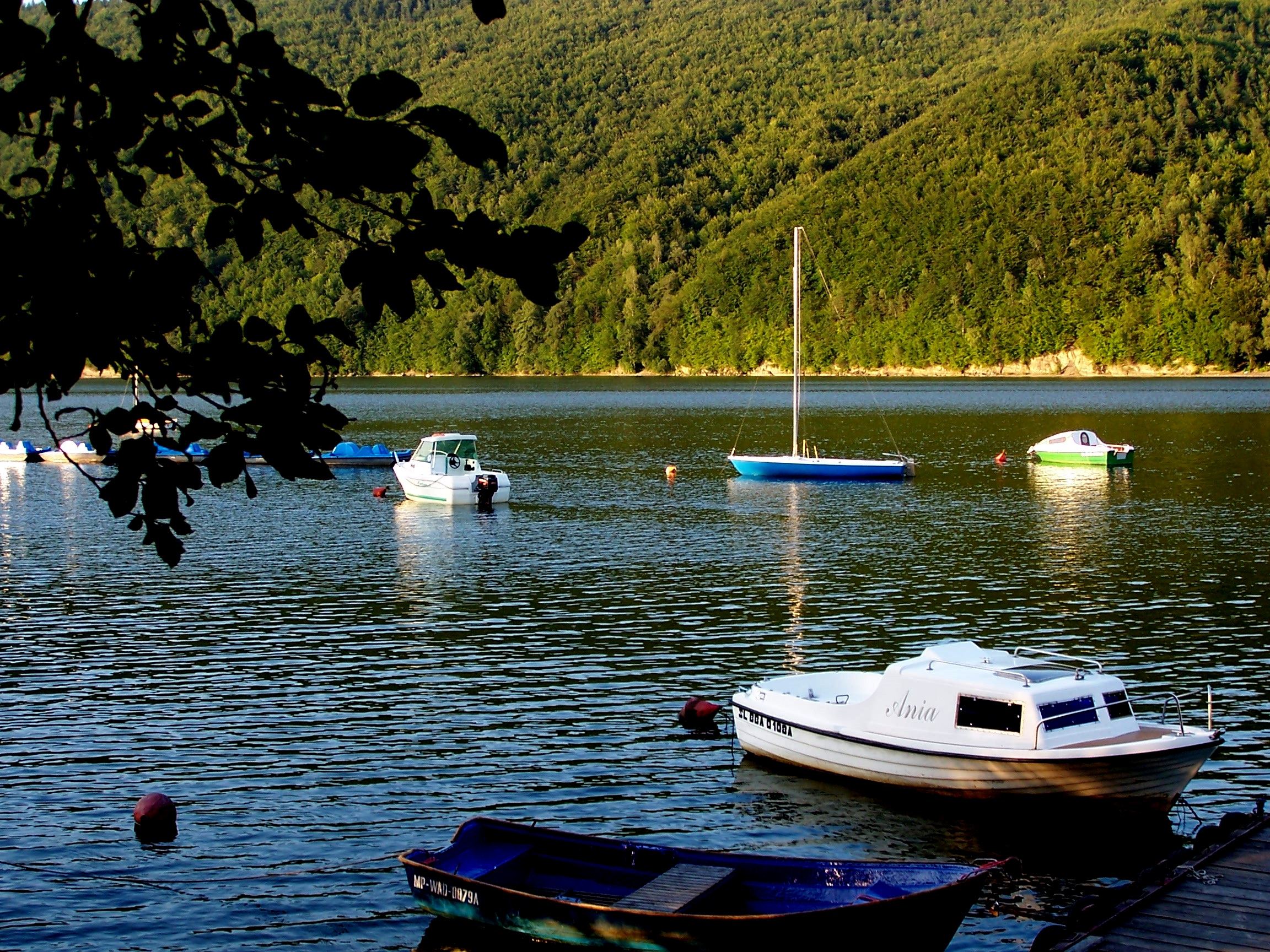 Jezioro